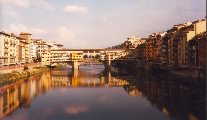 El río Arno a su paso por el Ponte Vecchio de Florencia. Firenze, view of Ponte Vecchio, 1993, photo by User:Infrogmation